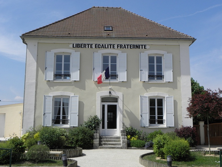 Mairie de Pécy (77).